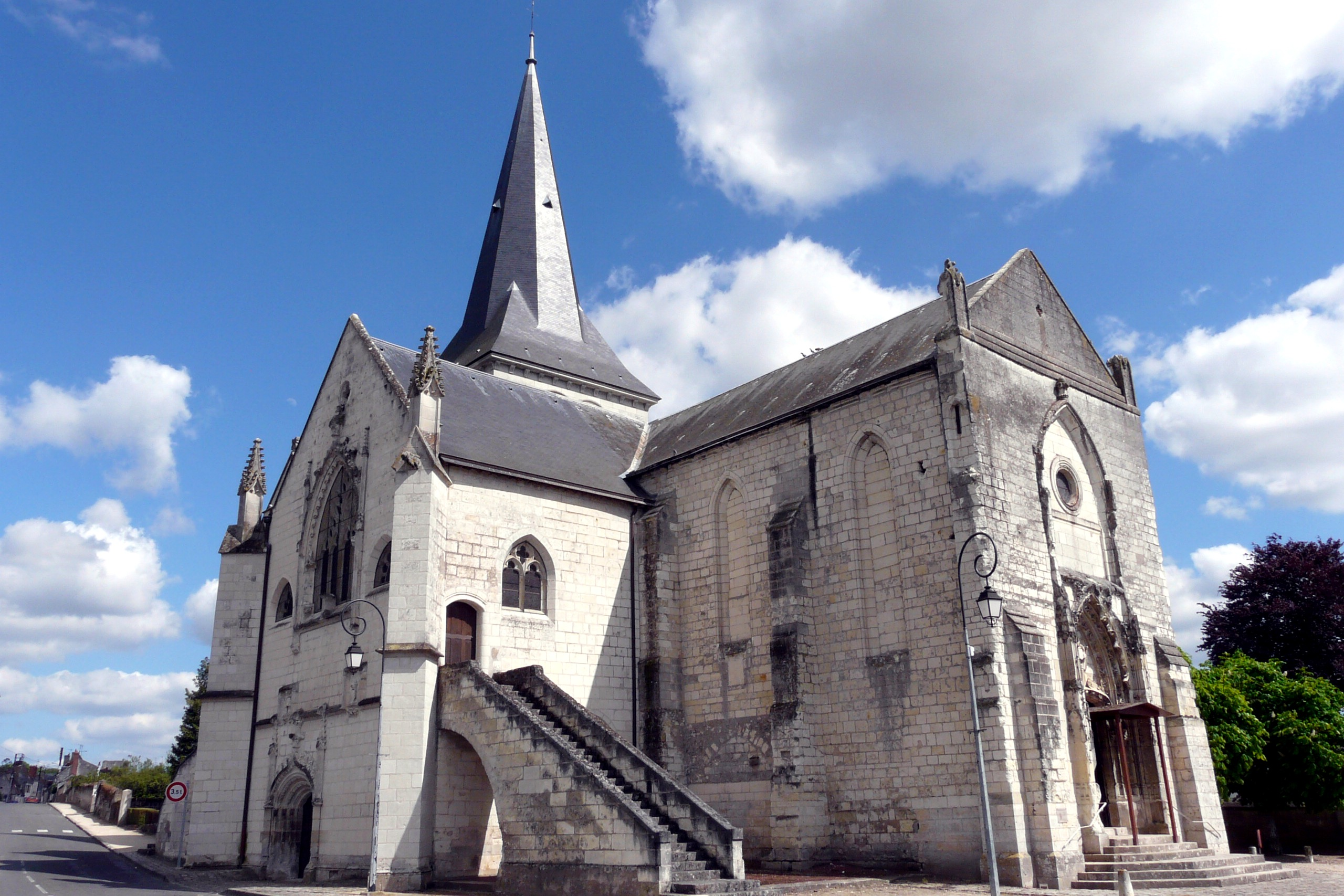 Description